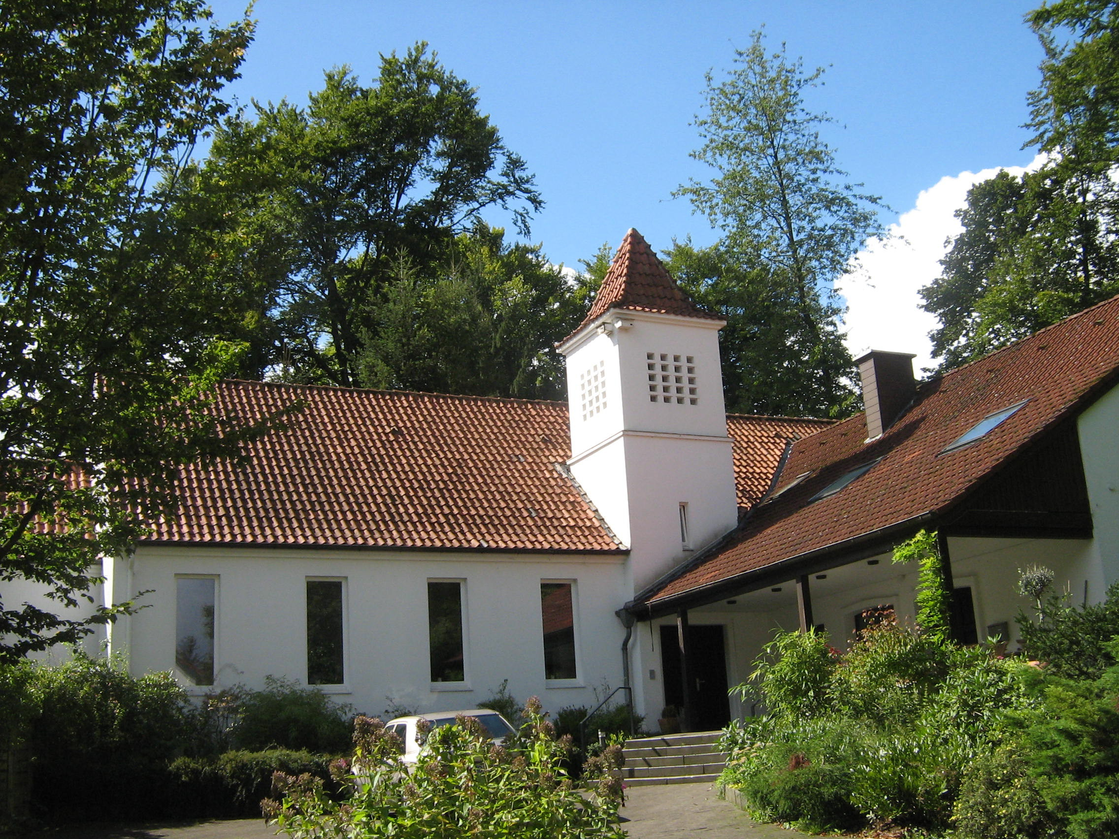 Ehemalige evangelische Christuskirche, Wellensiek, Bielefeld